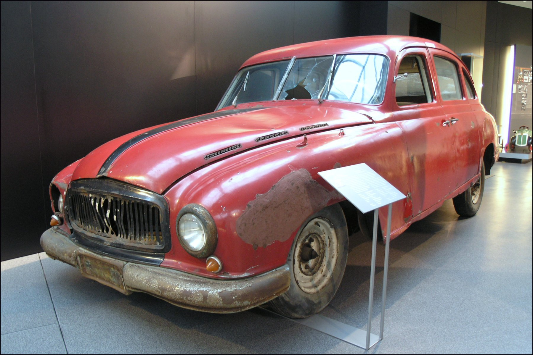 Horch 920 S. 1950 gebauter Prototyp, im VEB Kraftfahrzeugwerk Horch Zwickau (später Sachsenring).